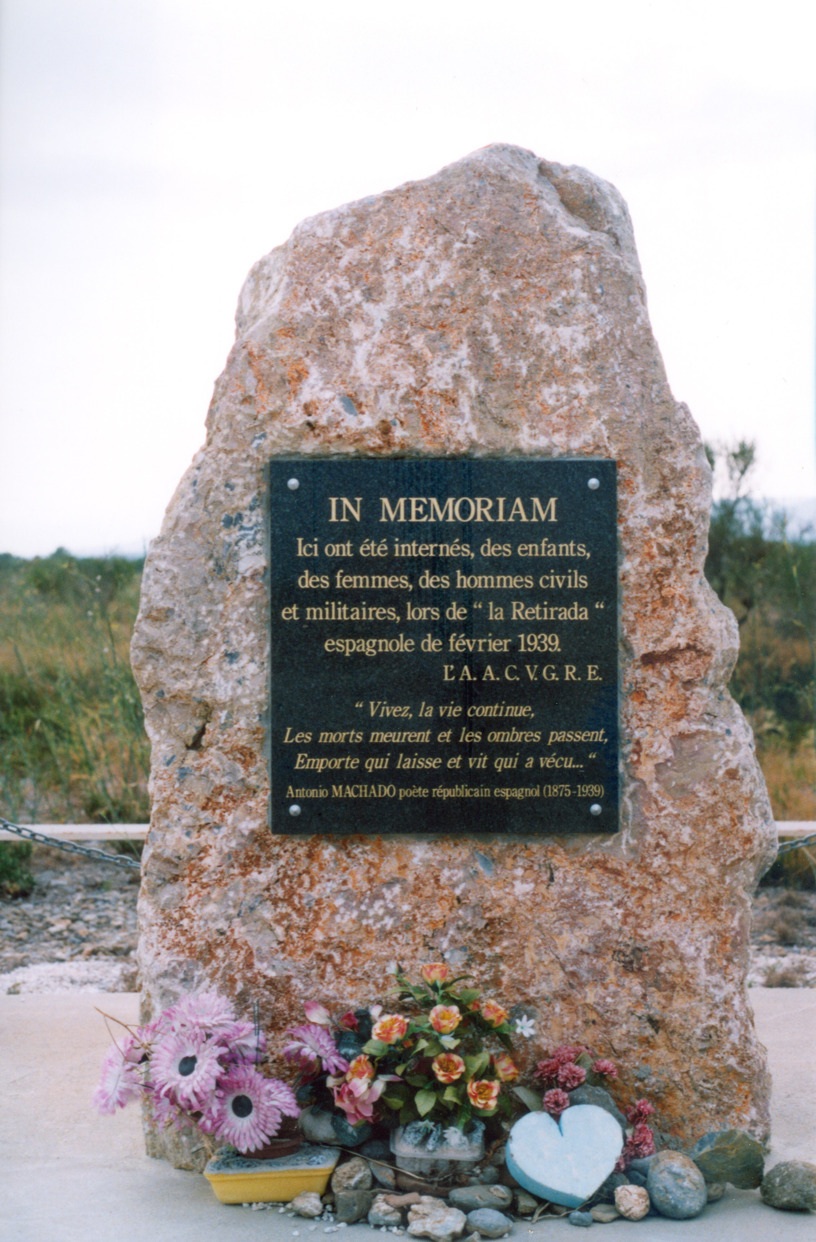 Rivesaltes